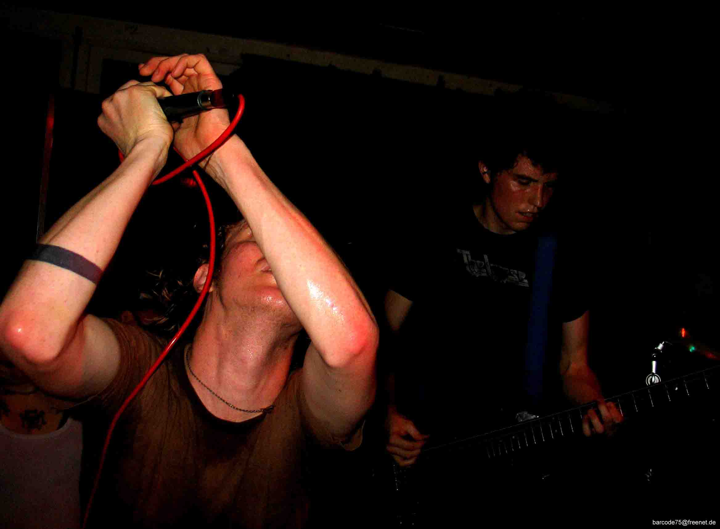 05.06.05 Baracke, Münster Diner